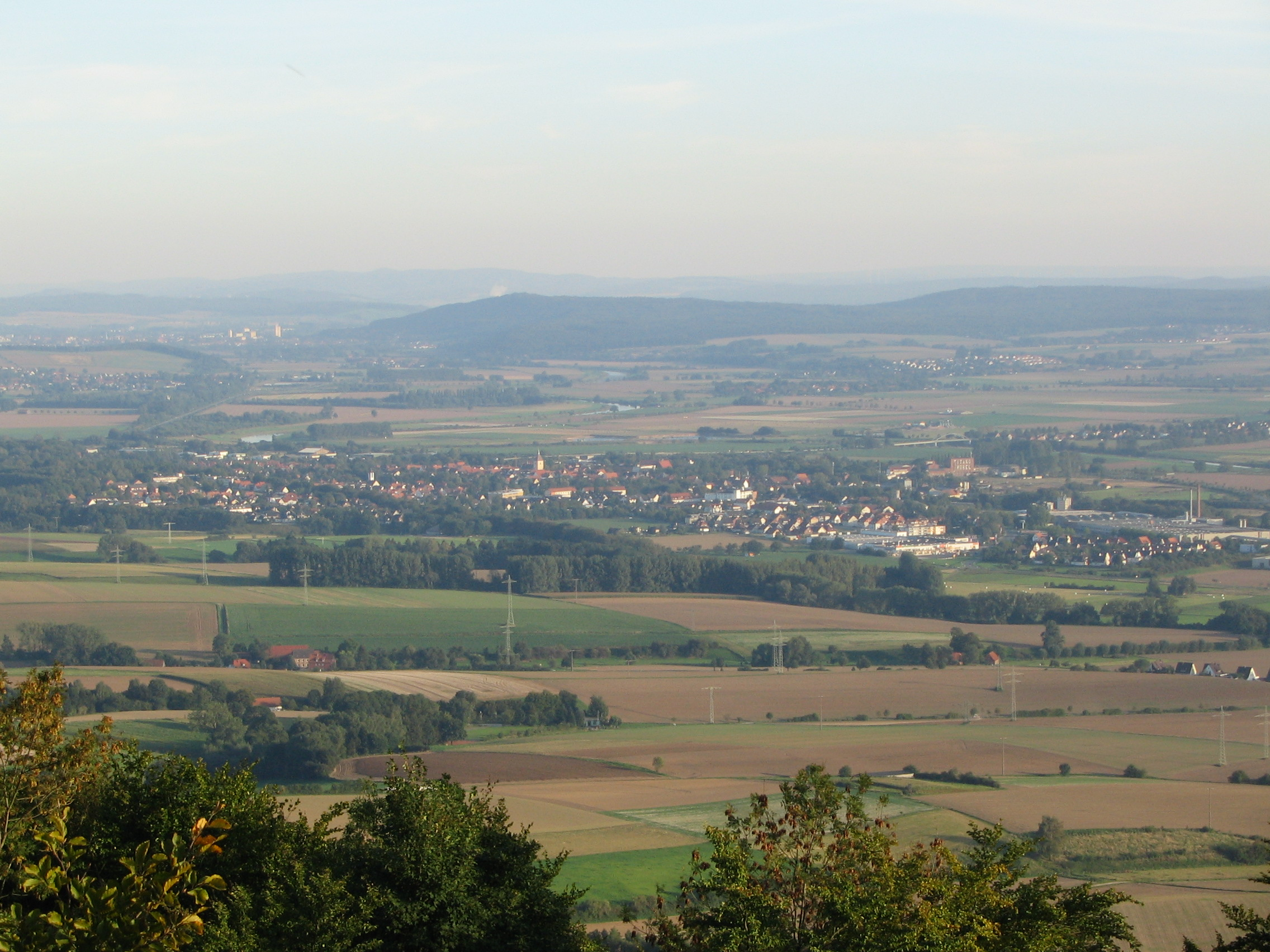 Blick über das Wesertal auf die Stadt Hessisch Oldendorf, von der Paschenburg aus fotografiert.